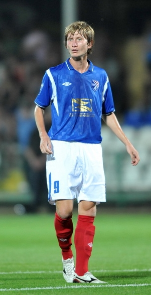 Станислав Владимирович Причиненко — украинский футболист.